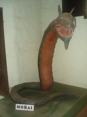 Moñai. Mitología guaraní